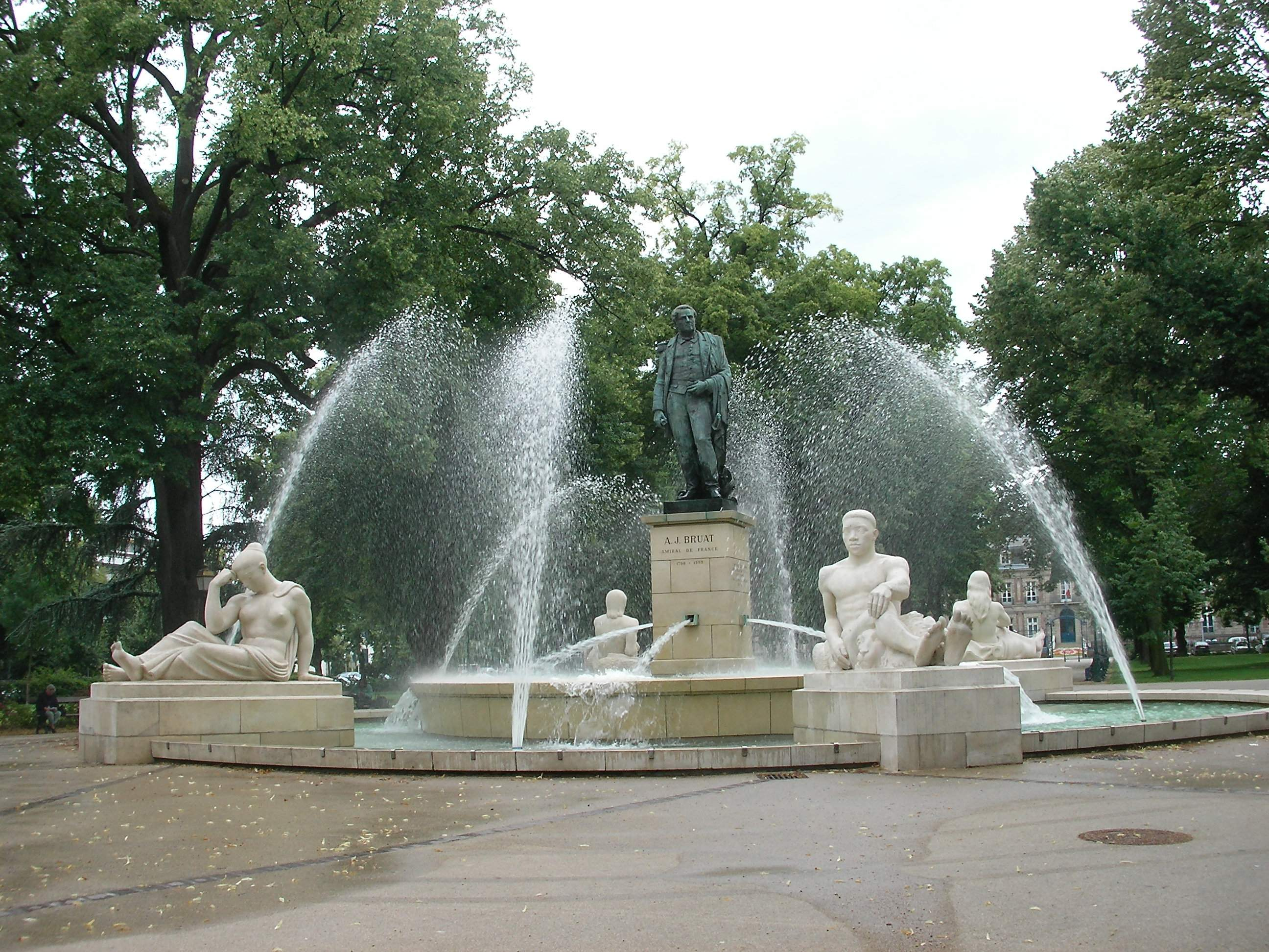 Fontaine Bruat à Colmar (Haut-Rhin, France).